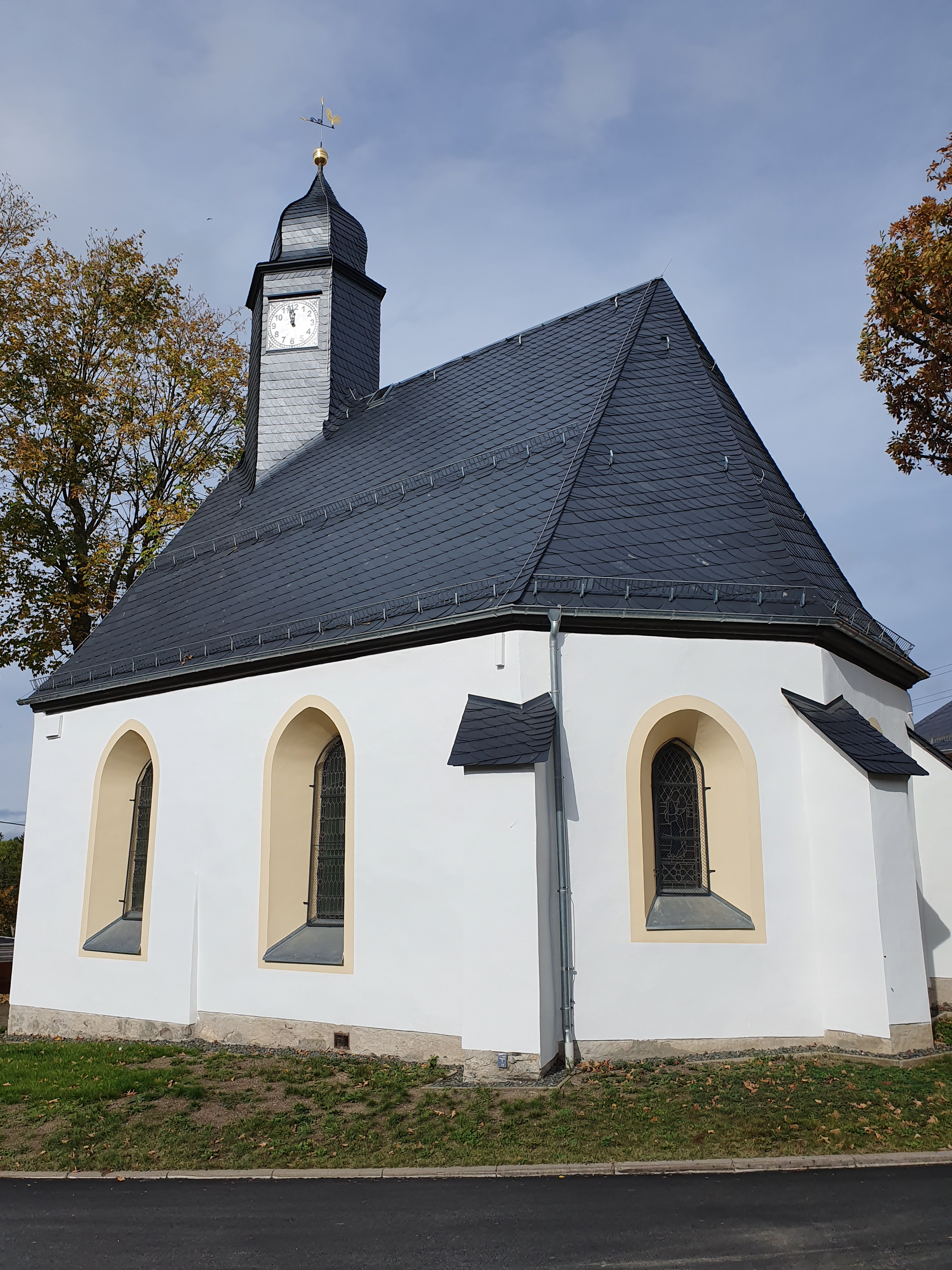 St. Maternus-Kirche in Mönchgrün in Thüringen